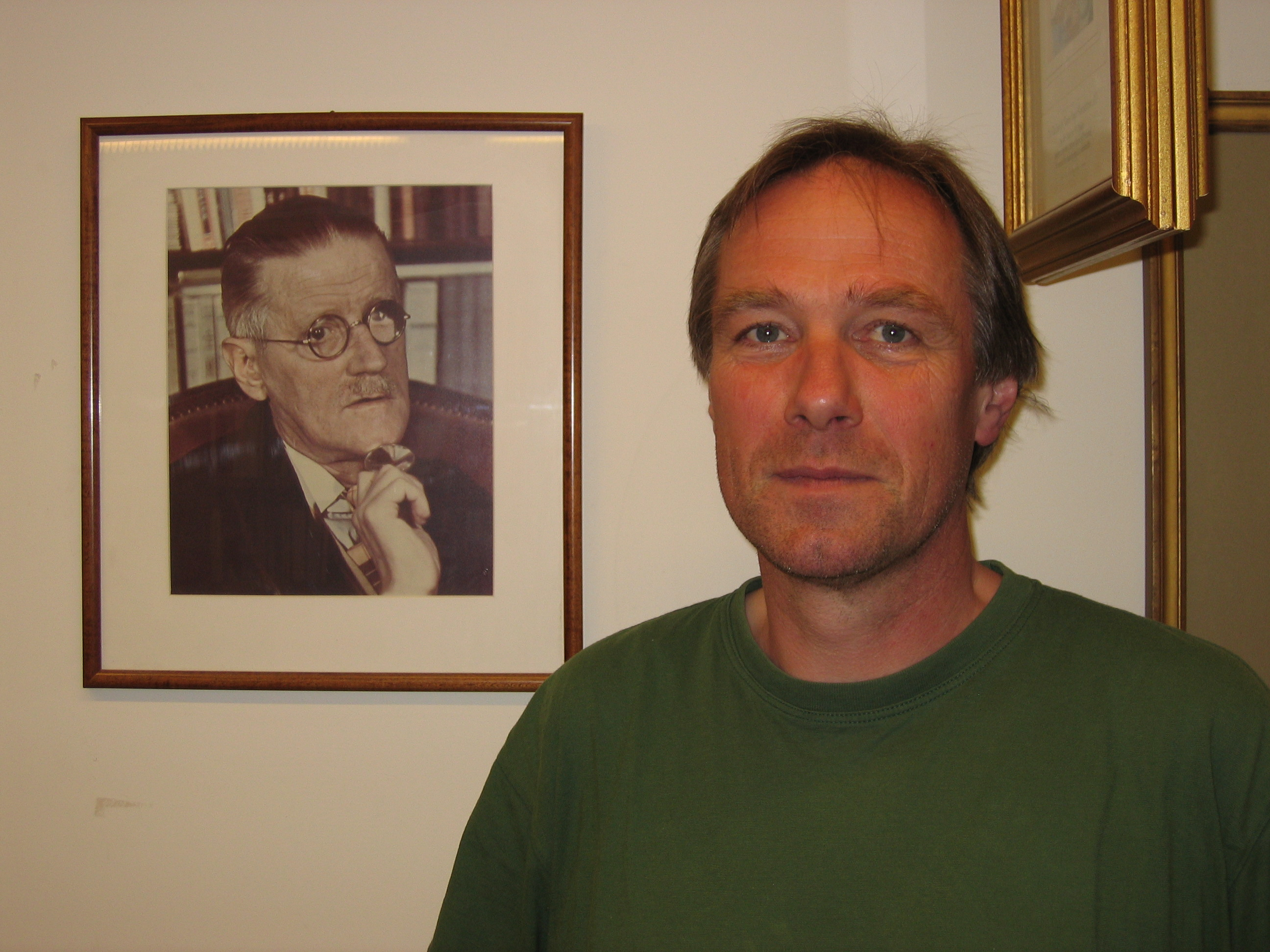 Friedhelm Rathjen in der Zurich James Joyce Foundation vor einem Foto von James Joyce, Mai 2010